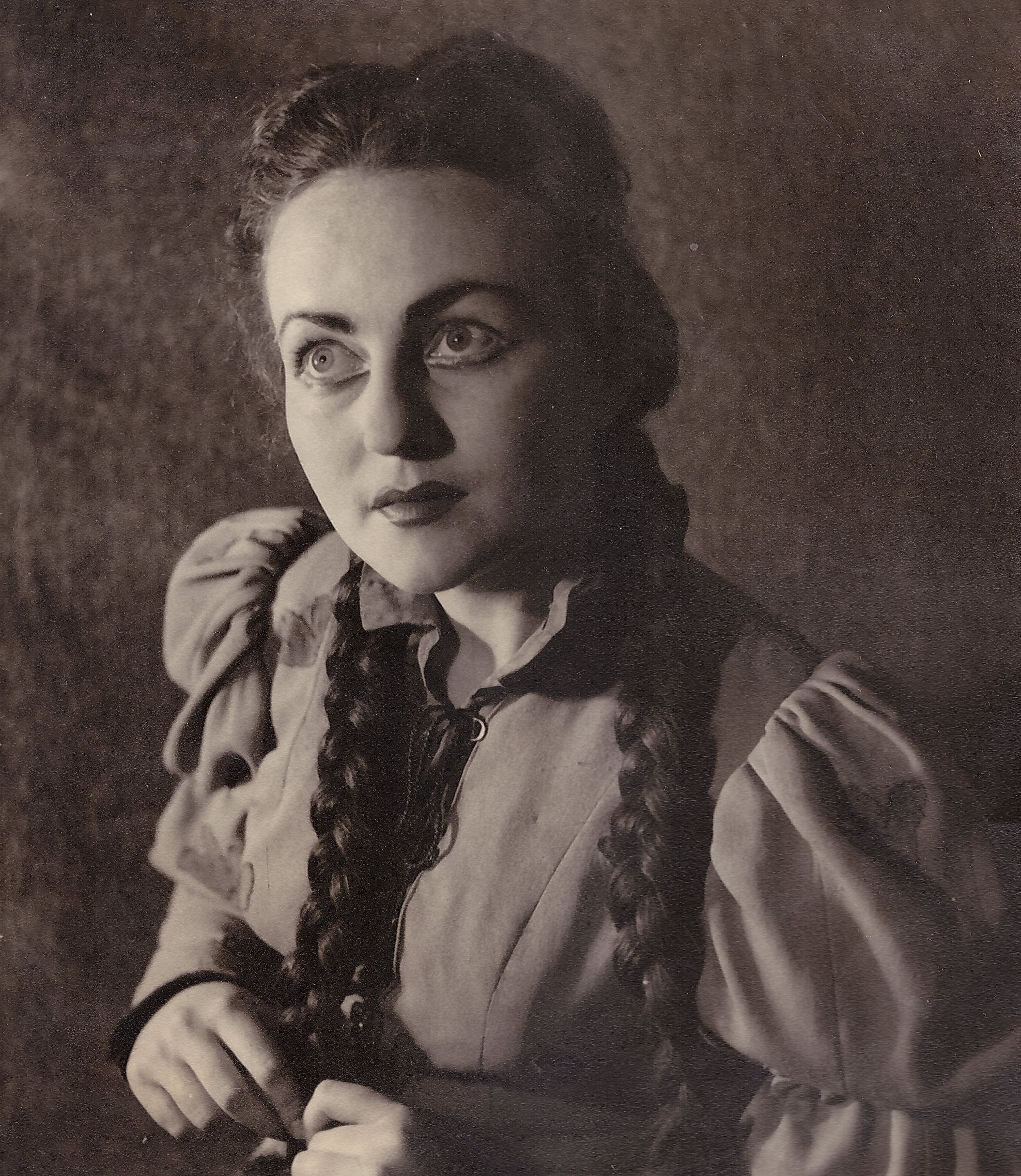 נחמה דוידית בהצגה יום ולילה